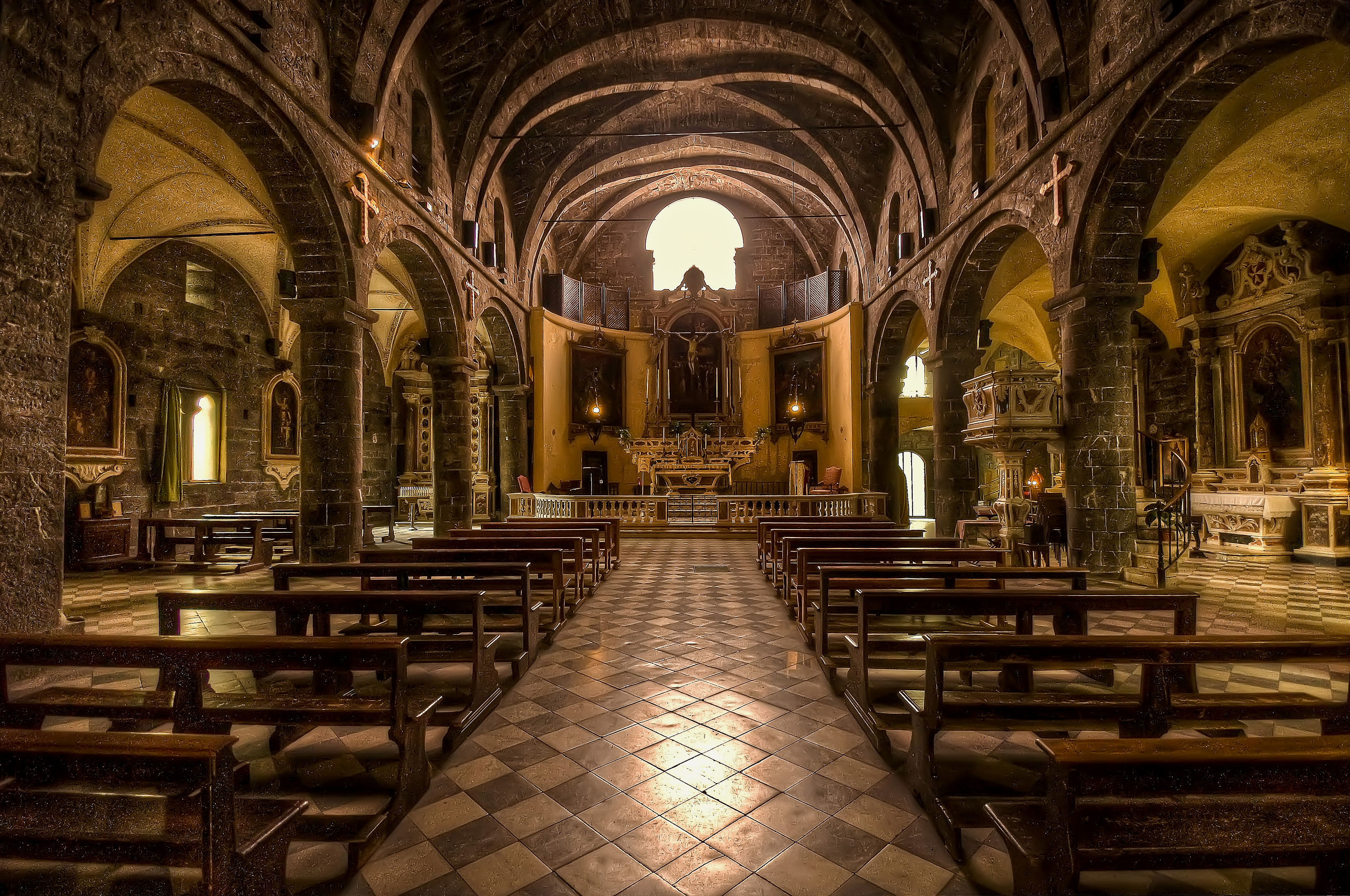 Commenda di San Giovanni di Pré This is a photo of a monument which is part of cultural heritage of Italy.